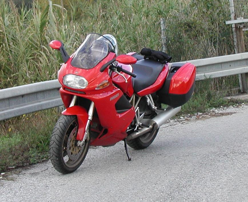 Ducati ST4 (1999) Foto scattata il giorno 08/12/2006 vicino a Massarosa.